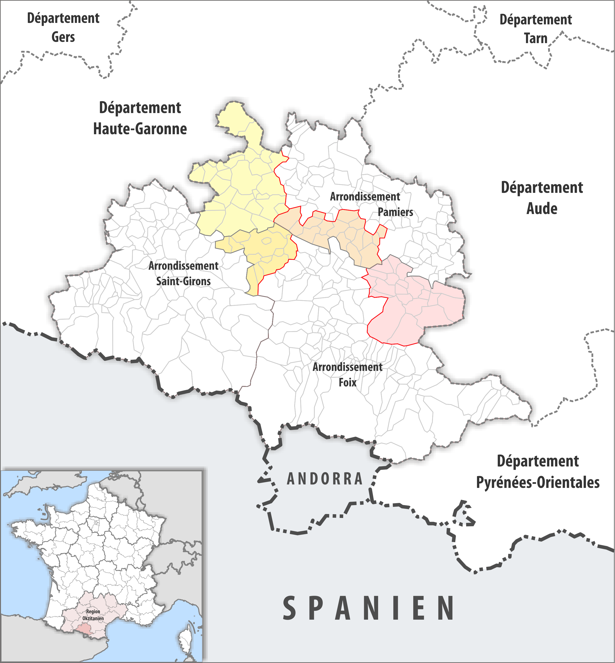 Arrondissements Anpassungen auf 2017 im Departement Ariège